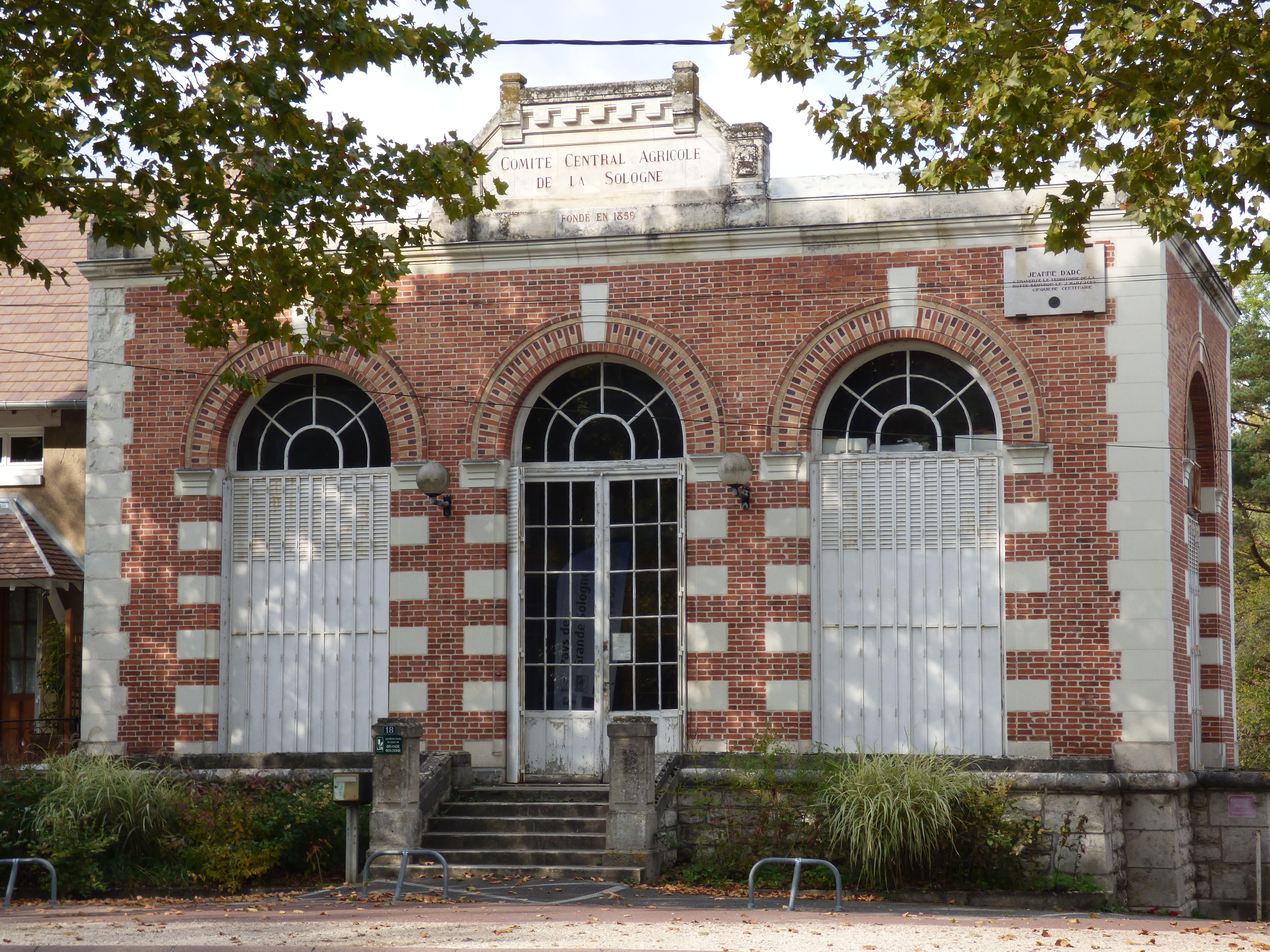 Fondé par décret du 25 juin 1859.